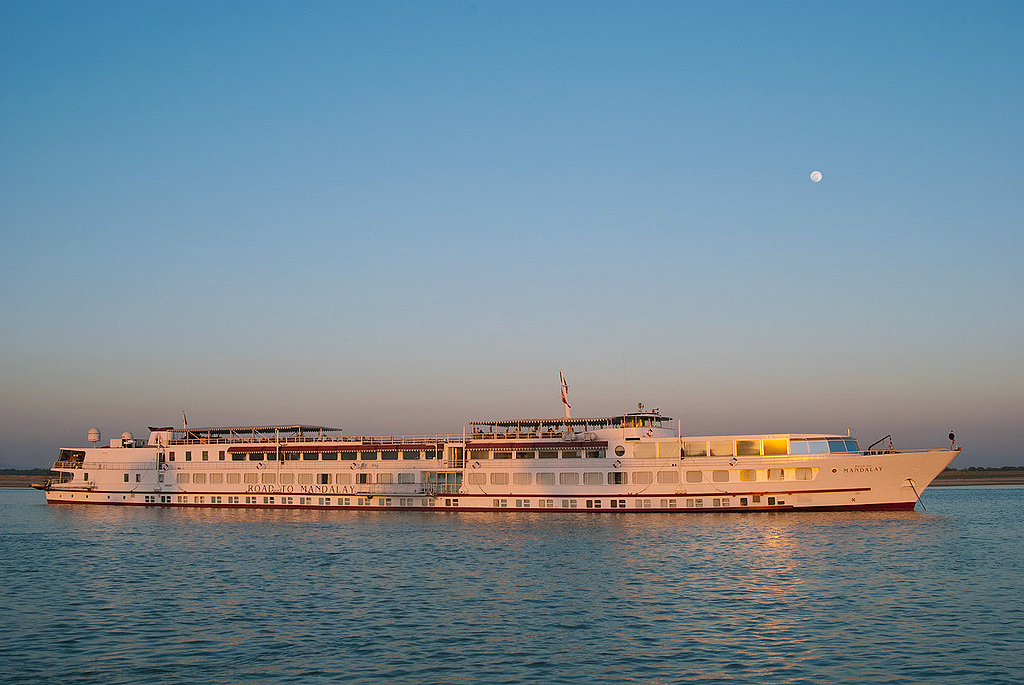 Die Road to Mandalay vor Anker